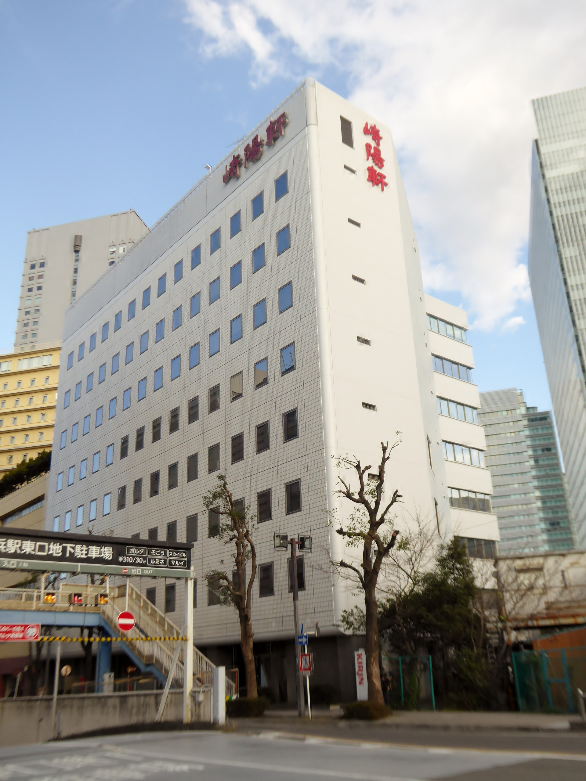 株式会社崎陽軒本社を撮影。